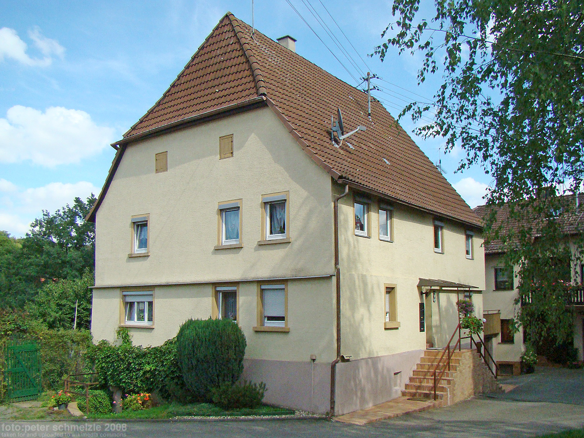 Denkmalgeschütztes Anwesen Rappengasse 10 in Heilbronn-Biberach